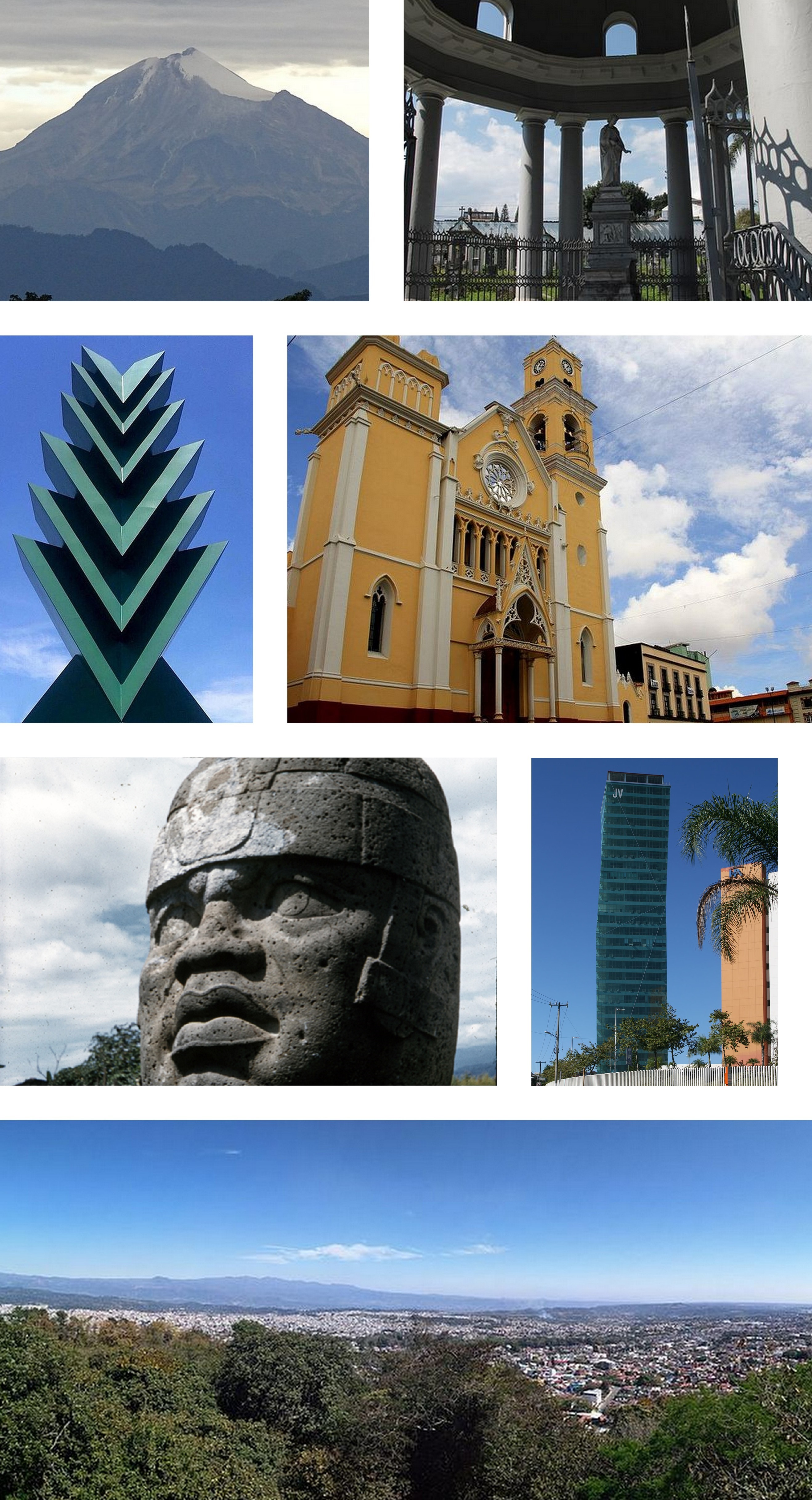 Montaje creado a partir de siete imágenes en Wikimedia Commons: File:Pico de Orizaba - Viewed from Balcon del Alferez - Xalapa - Veracruz - Mexico (15900101448).jpg File:Xalapa Museum, Veracruz, La Venta, Olmec (14038749787c).jpg File:La Catedral Metropolitana de Xalapa.jpg File:Panoramica de Xalapa.jpg File:Araucaria de Xalapa.jpg File:TCMayor.jpg File:Tumba General Enriquez.jpg